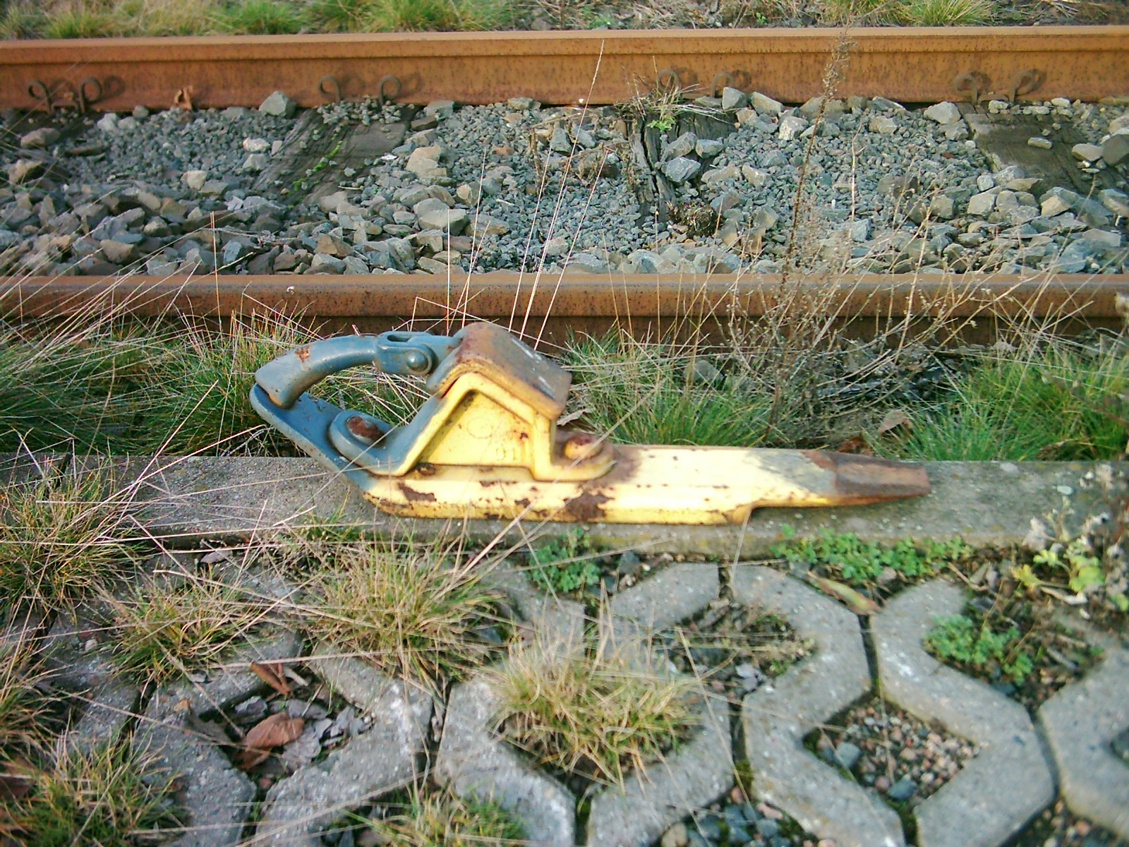 Hemmschuh zum Abbremsen von Eisenbahnwagen, Hansaport Hamburg.